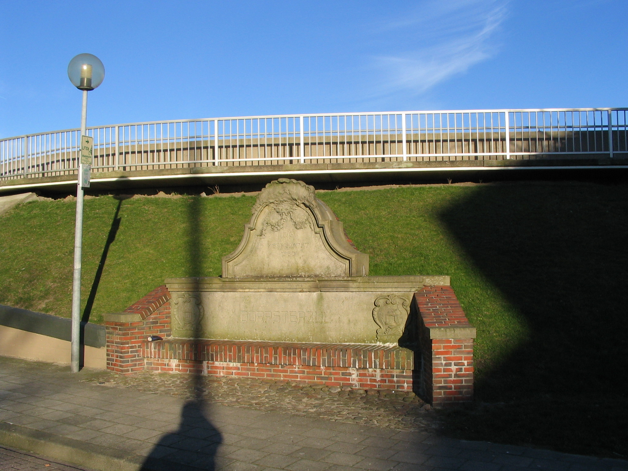 Gedenksteen voor Dorpsterzijl in Delfzijl.